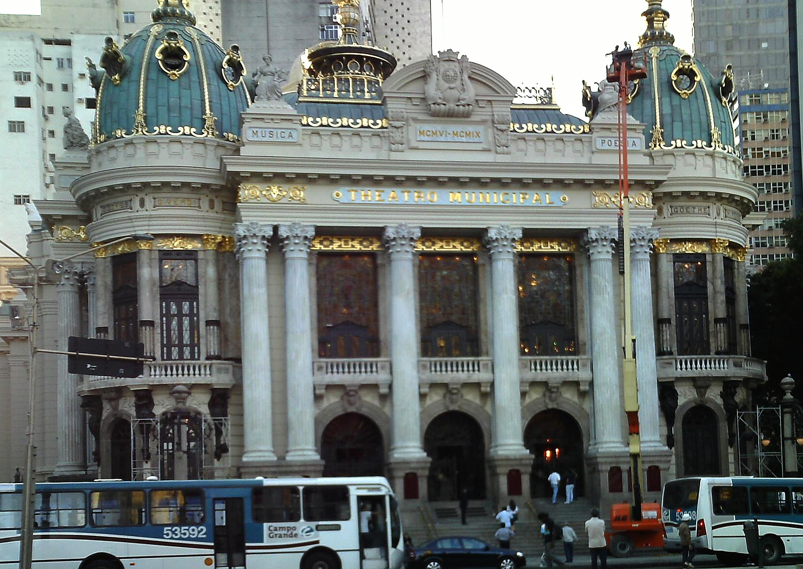 Theatro Municipal, em 22-05-2010.